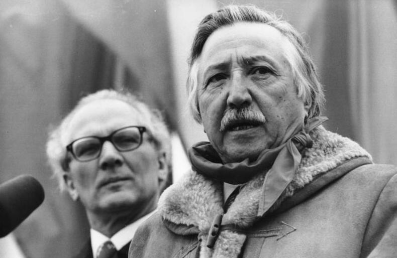 Berlin, Luis Corvalan und Erich Honecker ADN-ZB/Kohls/28.1.77/Berlin: Luis Corvalan in der DDR eingetroffen. Der Generalsekretär der Kommunistischen Partei Chiles, Luis Corvalan (r.), traf am 28.1.77 zu einem mehrtägigen Besuch in der DDR auf dem Flughafen Berlin-Schönefeld ein. Der leidenschaftliche Internationalist folgte einer Einladung des Generalsekretärs des ZK der SED und Vorsitzenden des Staatsrates der DDR, Erich Honecker (l,). Nach der Begrüßung durch die Partei und Staatsführung sprach Luis Corvalan zu den mehr als 50 000 Bürgern, die sich zu seiner Begrüßung versammelt hatten. Abgebildete Personen: Corvalan, Luis: Generalsekretär der KP, Chile (GND 118522302) Honecker, Erich: Staatsratsvorsitzender, Generalsekretär des ZK der SED, DDR (GND 118553399)